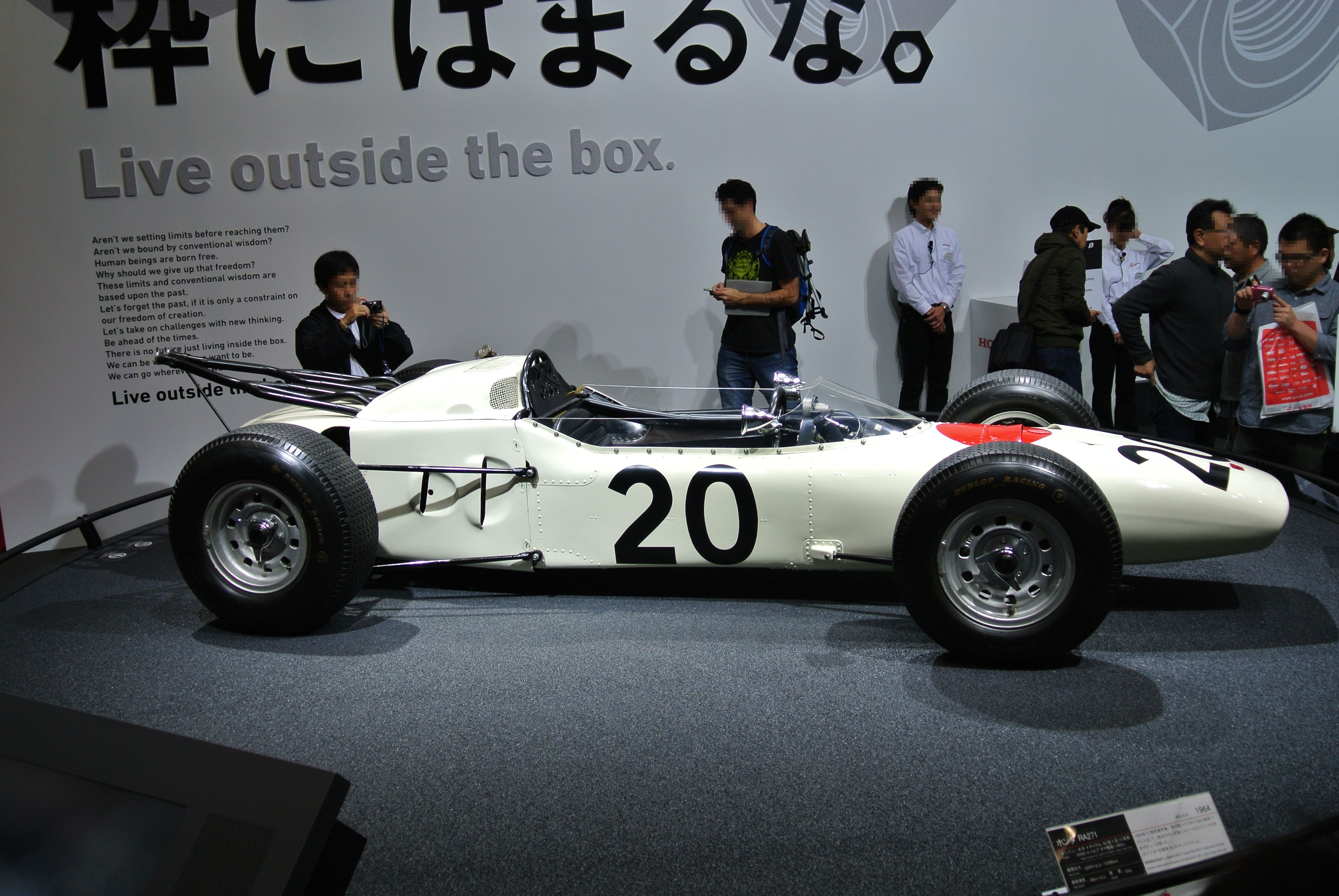 Honda RA271 at 43rd Tokyo Motor Show 2013